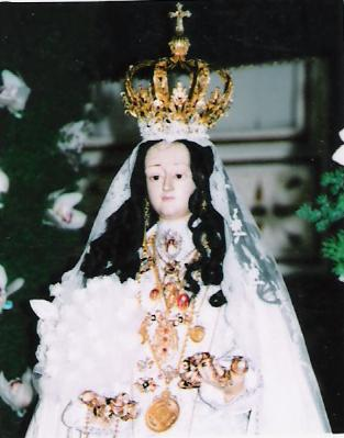 Imagem da Nossa Senhora das Necessidades, 28 de Agosto de 2005 Vestido oferecido no dia, pela D. Ana Maria Moreno. Igreja de Sto Aleixo da Restauração, Alentejo, Portugal.